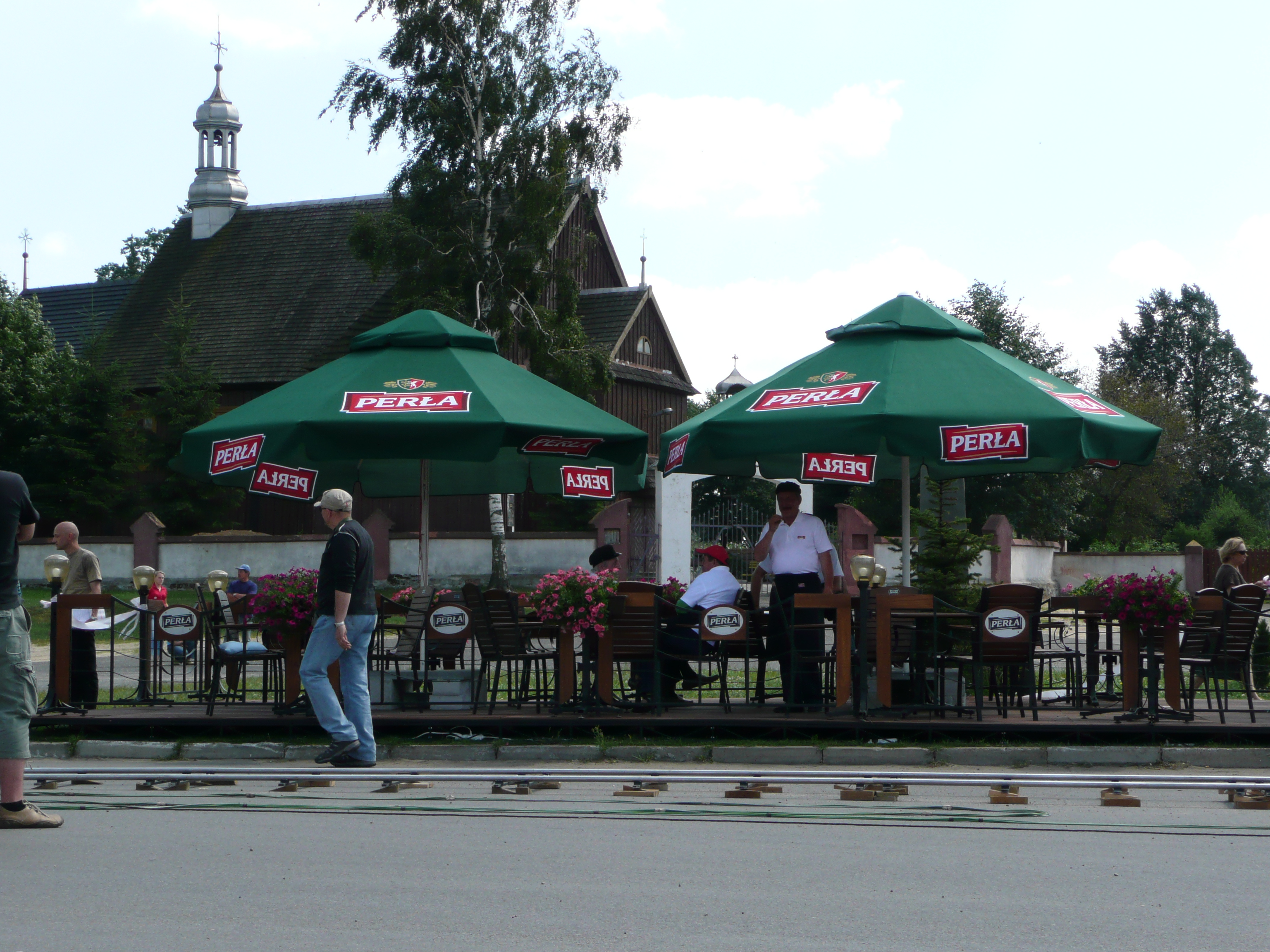 Making "Ranczo Wilkowyje" movie.